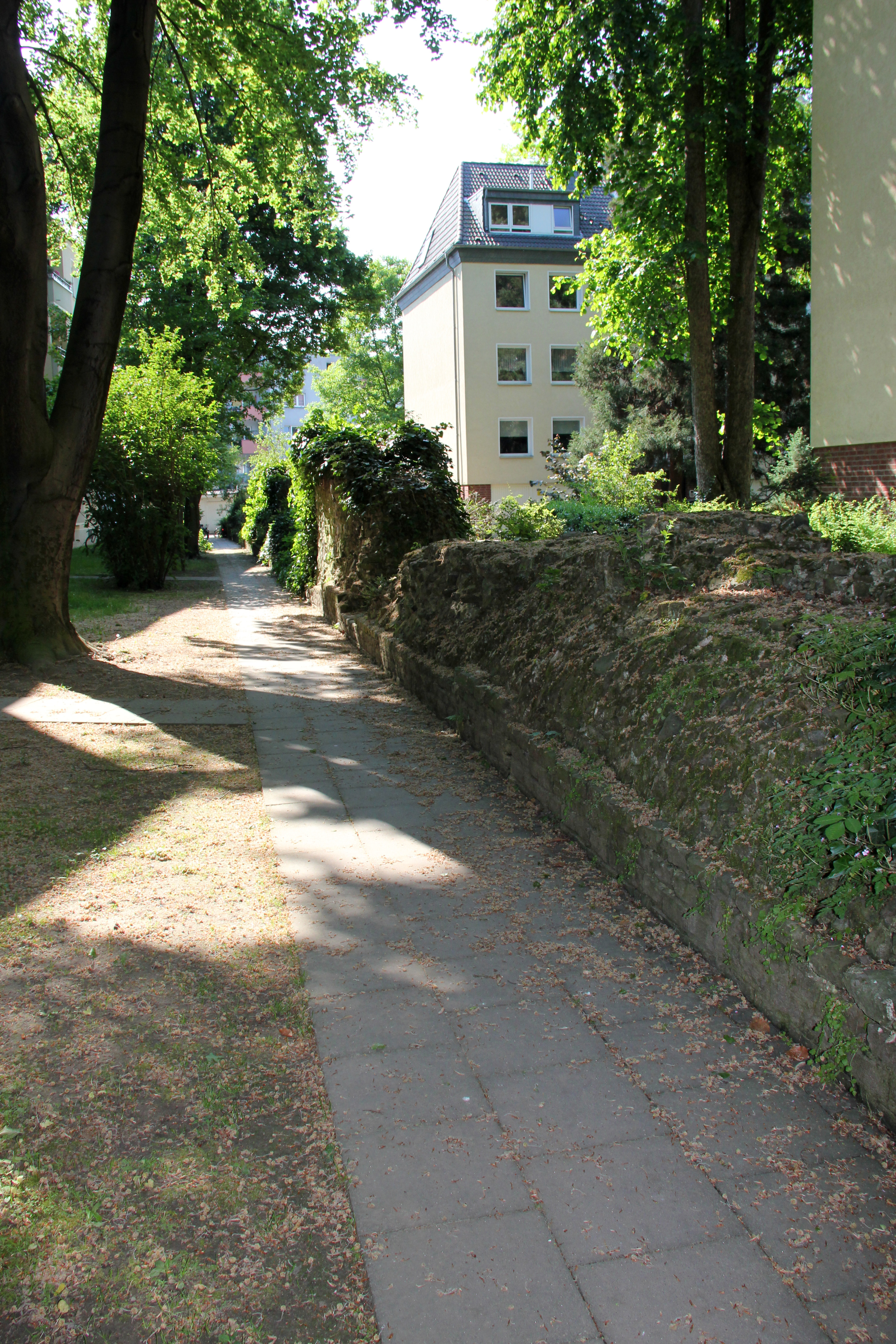 Köln,südwestliche Römermauer vor dem Mauritiussteinweg in südlicher Verlängerung der Clemensstraße